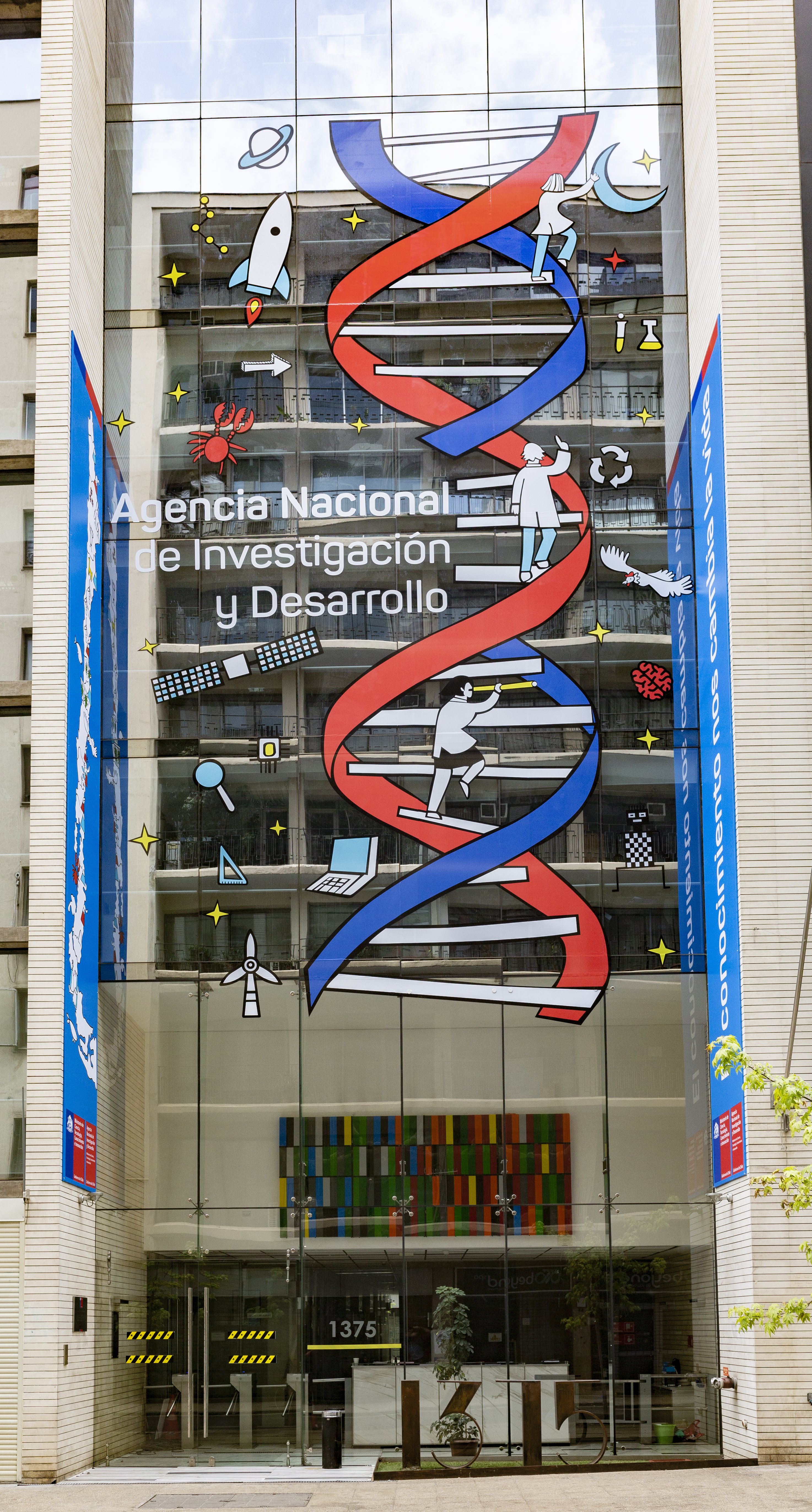 Muestra la Fachada del edificio de la Agencia Nacional de Investigación y Desarrollo, ubicada en Santiago de Chile, en Moneda 1375. Se trata del servicio encargado de administrar y ejecutar los programas e instrumentos destinados a promover, fomentar y desarrollar la investigación en todas las áreas del conocimiento, el desarrollo tecnológico y la innovación de base científico-tecnológica, de acuerdo a las políticas definidas por el Ministerio de Ciencia, Tecnología, Conocimiento e Innovación. La ANID es la continuadora de la antigua Comisión Nacional de Investigación Científica y Tecnológica (CONICYT).